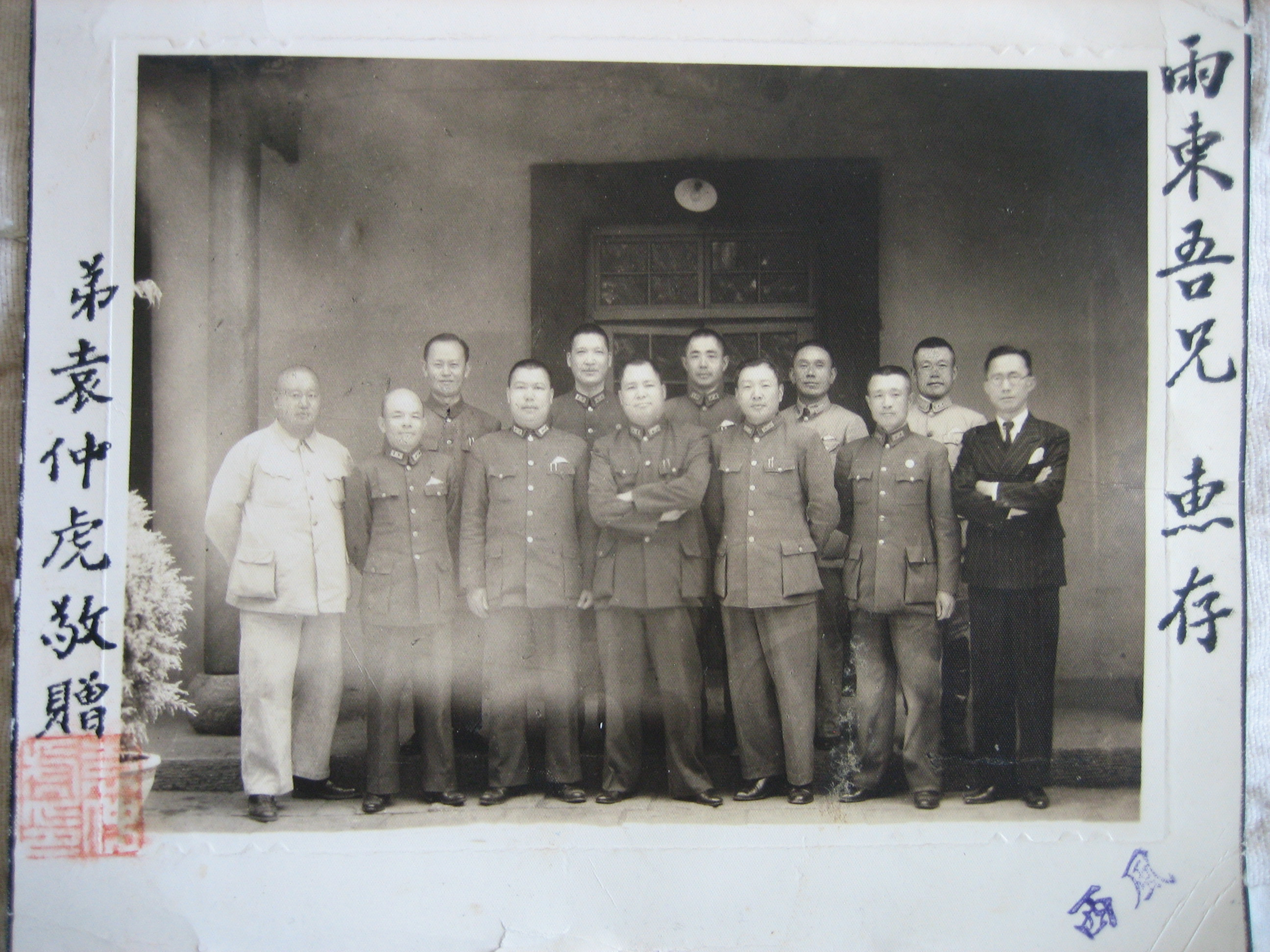 前列左より：不明、潘佑強、霍揆彰、關麟徵、宋希濂、杜聿明、不明 後列左より：袁鴻逵（陳秀生とも）、張耀明、陳明仁、李鴻謨、邱清泉。